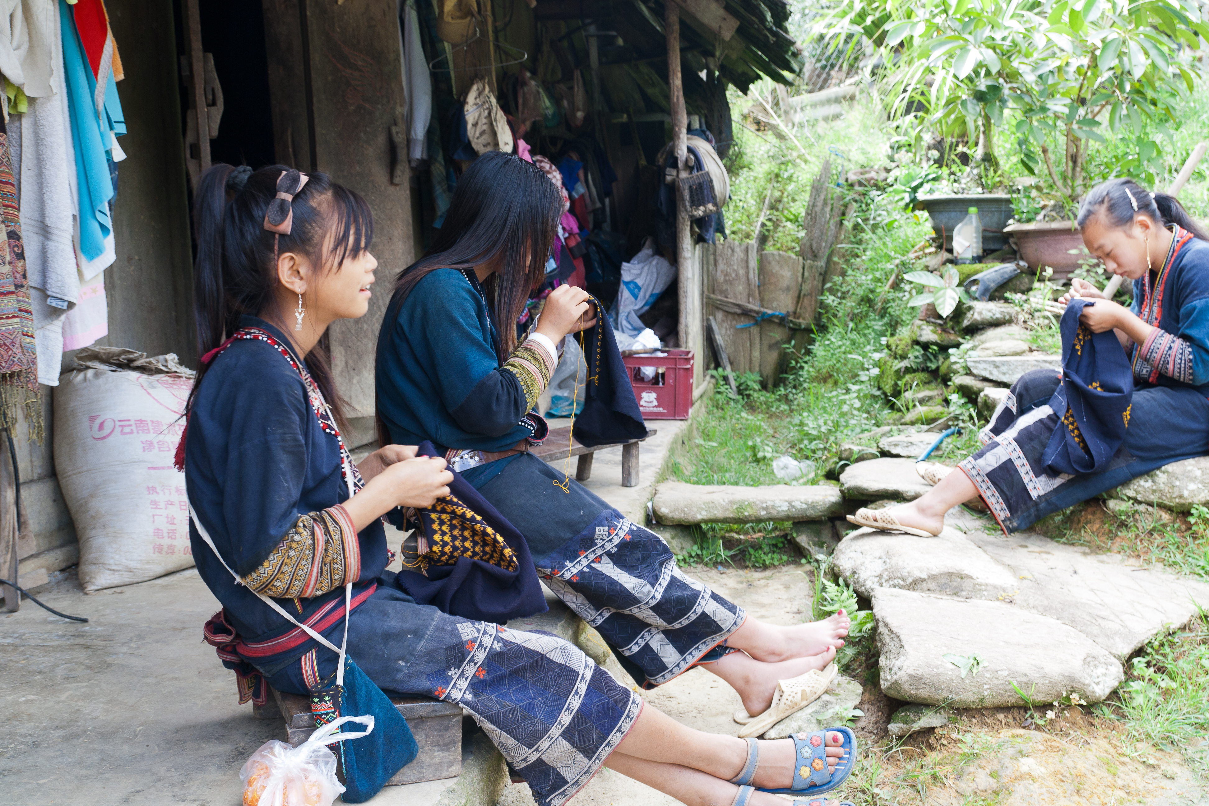 Black Hmong women in Sa Pa, Vietnam